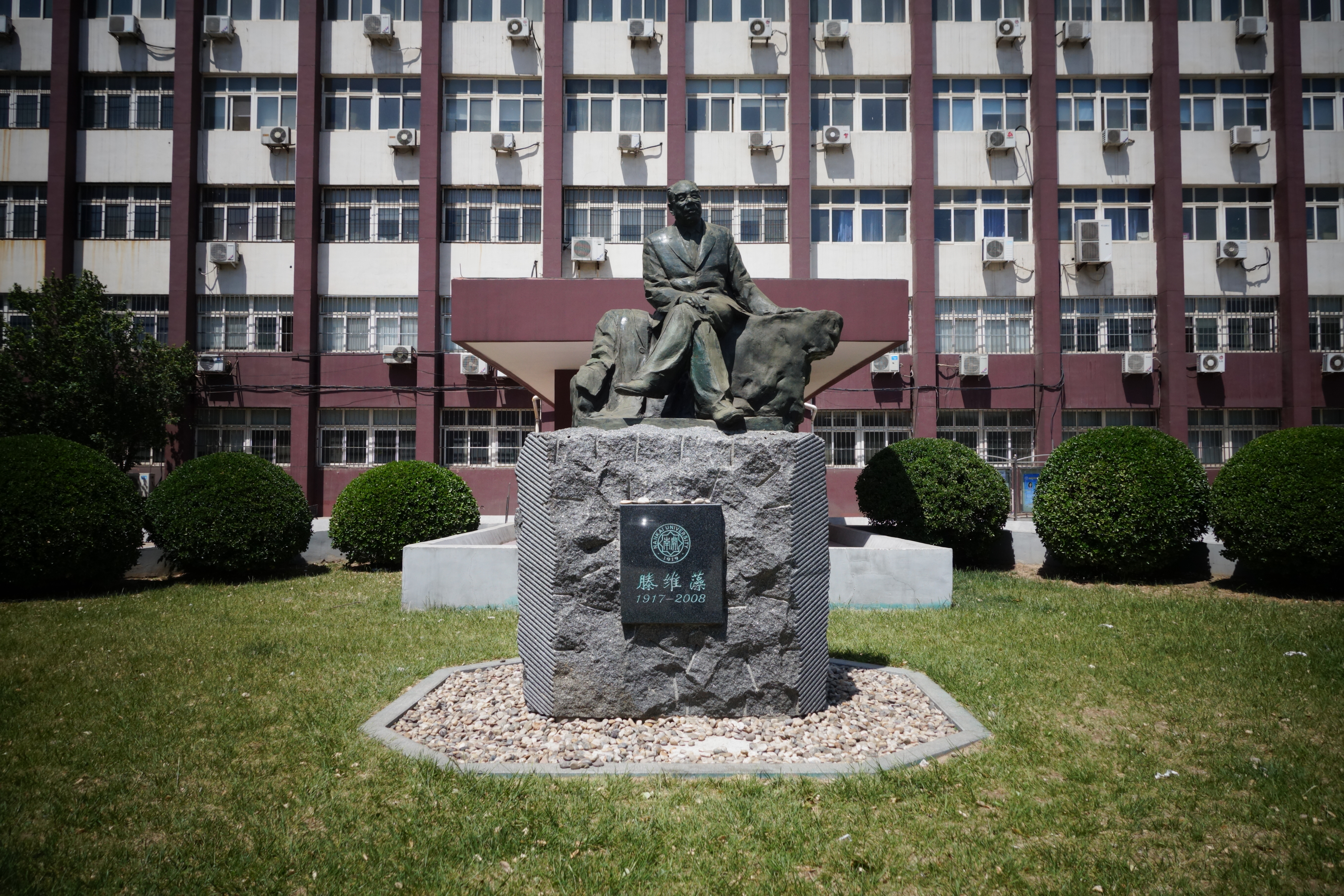 中文（中国大陆）: 南开大学滕维藻雕像